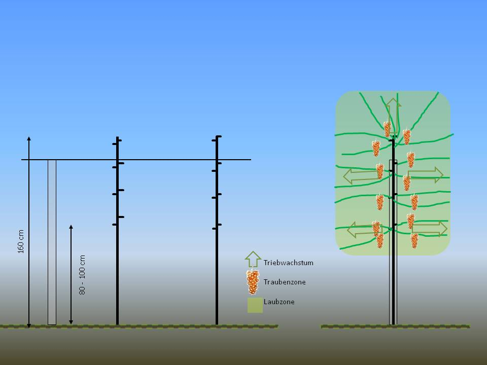 Schematische Darstellung der Vertiko-Erziehung